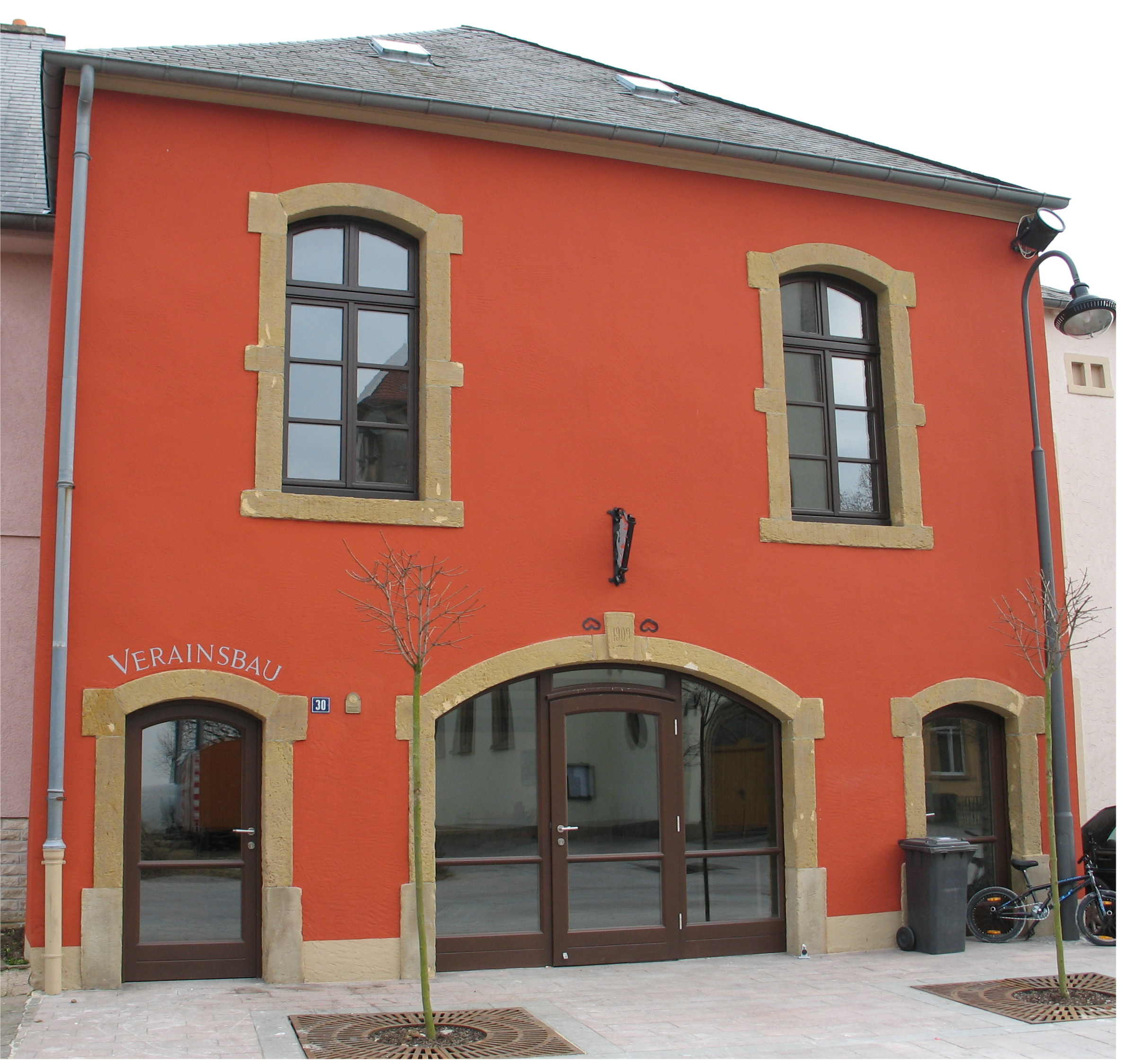 Veräinsbau zu Altréier.